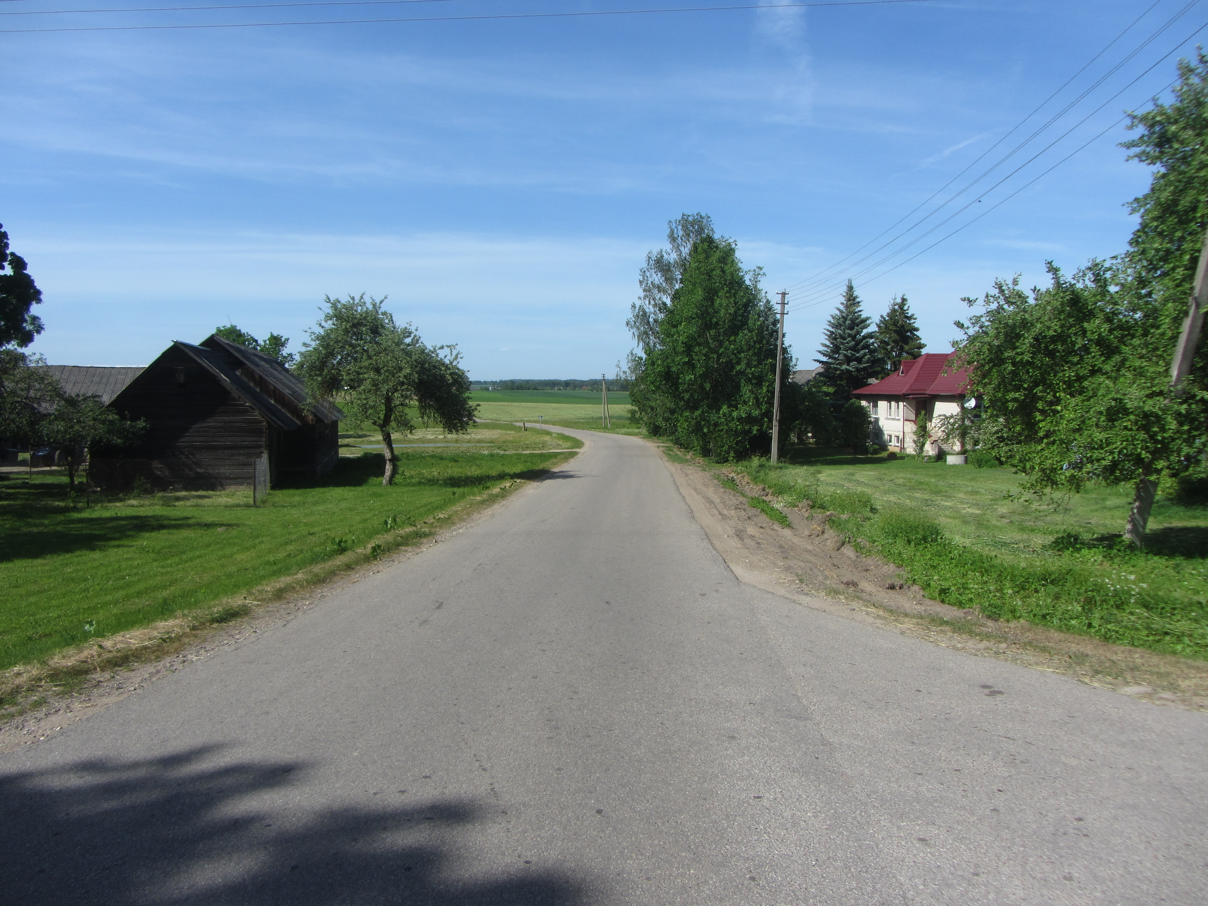 Bučiūnai, Lithuania